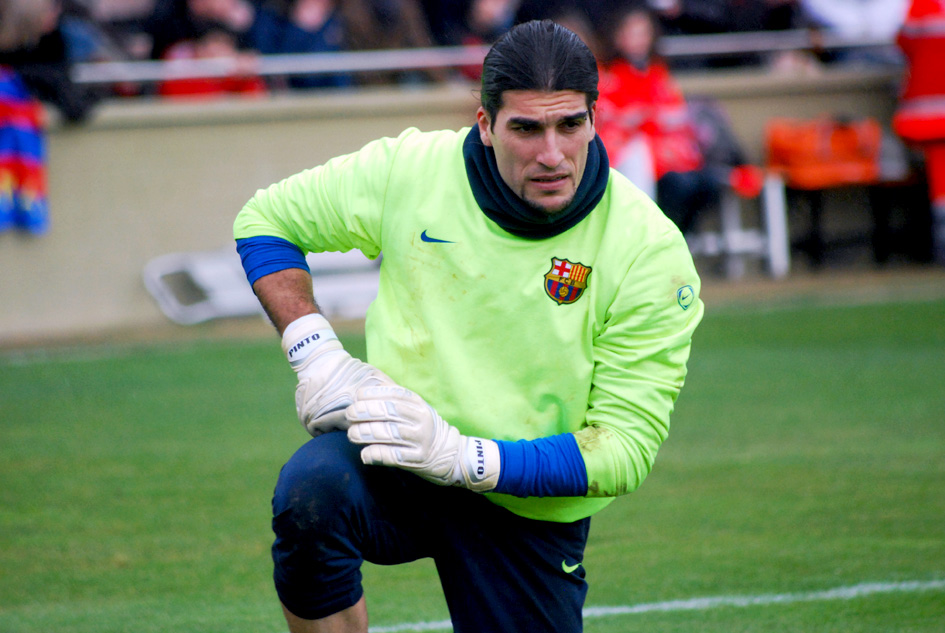 Pinto o Tau Pai Pai